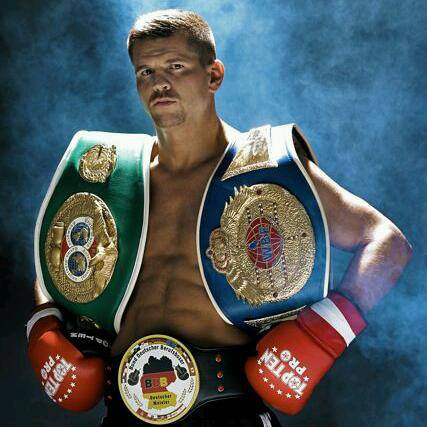 Gütel Jürgen Doberstein